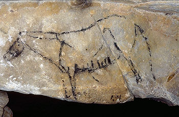 DIbujos y grabados paleolíticos en la cueva de las Monedas (Cantabria)